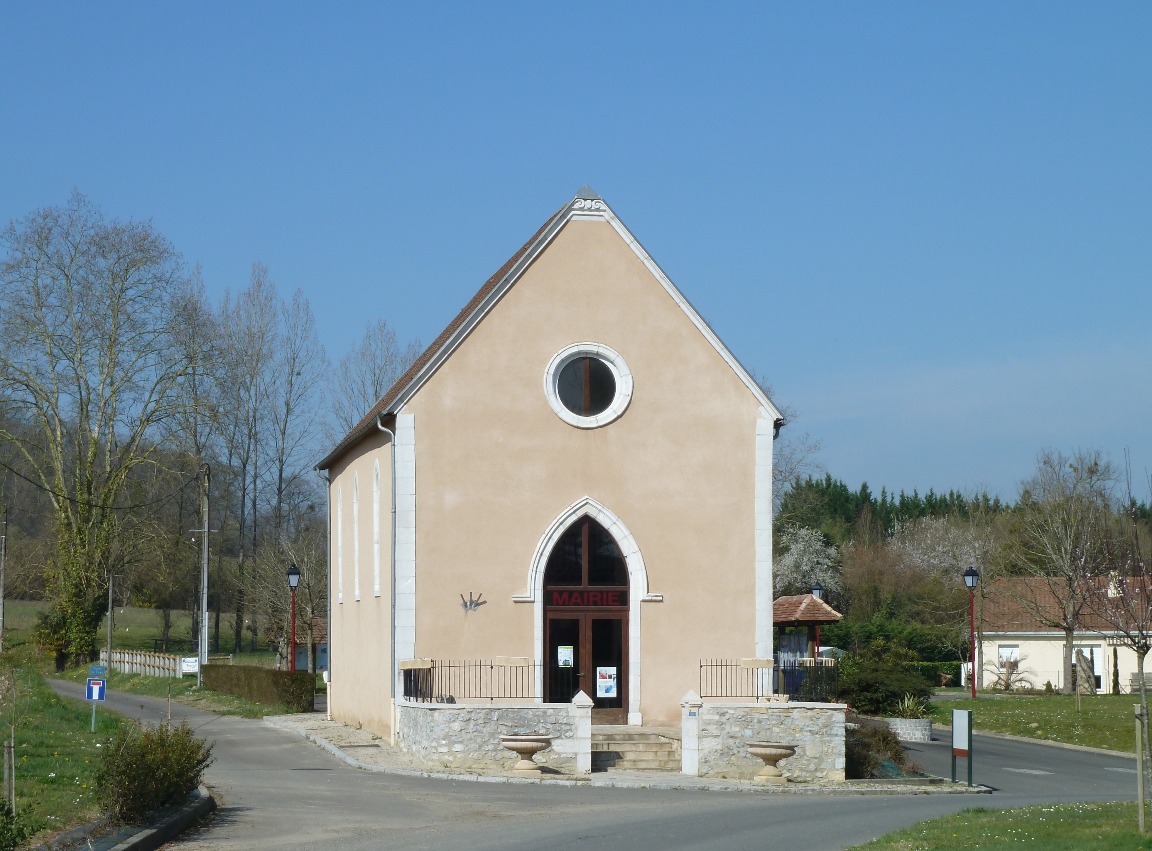 Mairie de Salles-Mongiscard